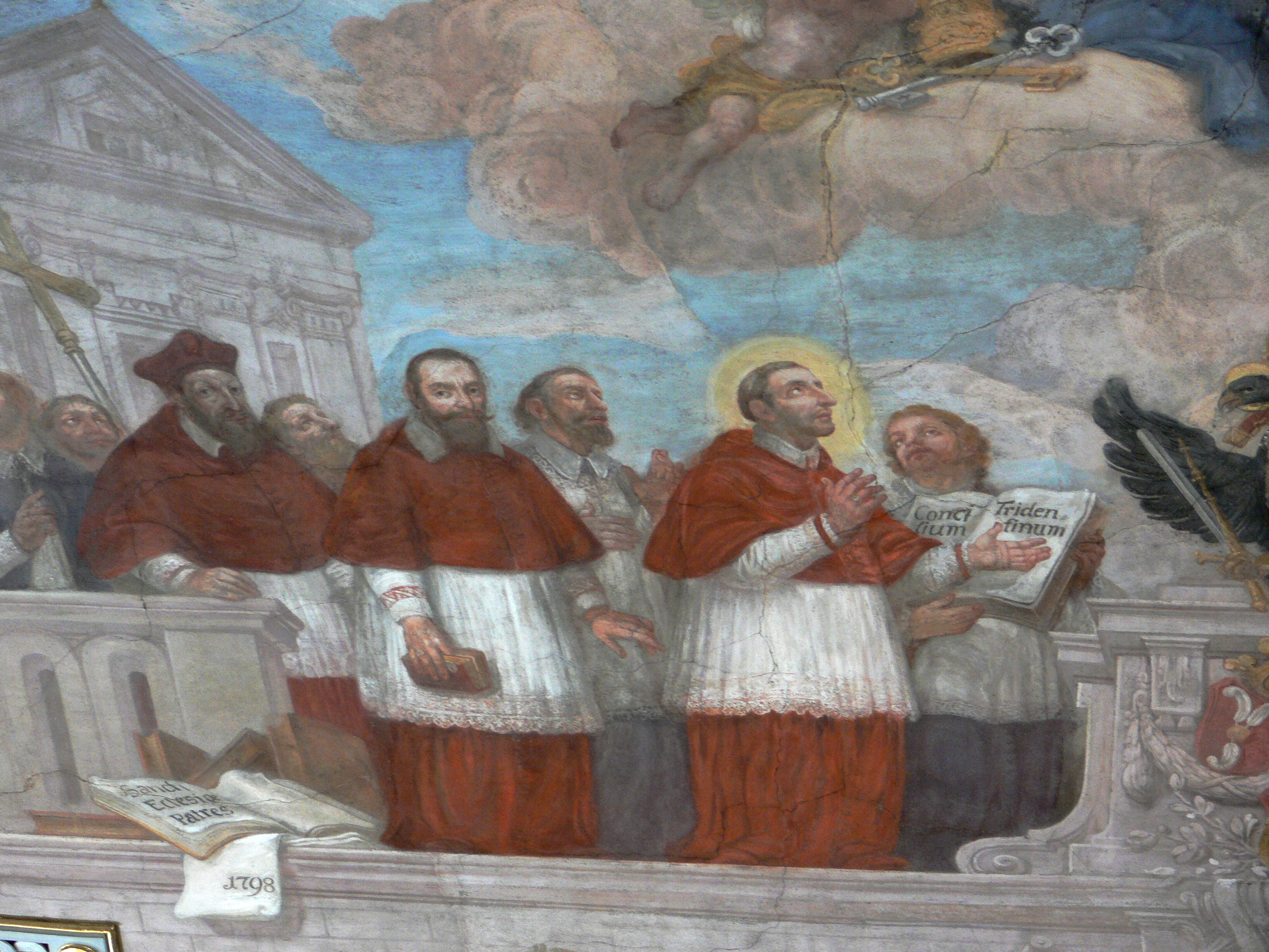 Hohenems, Vorarlberg: Pfarrkirche St. Karl Borromäus Fresko von Andreas Brugger, 1798 Allegorie des Konzils von Trient, Detail (Kardinal Markus Sittikus von Hohenems, der Salzburger Erzbischof Markus Sittikus von Hohenems, der hl. Karl Borromäus als Kardinal und Erzbischof von Mailand)